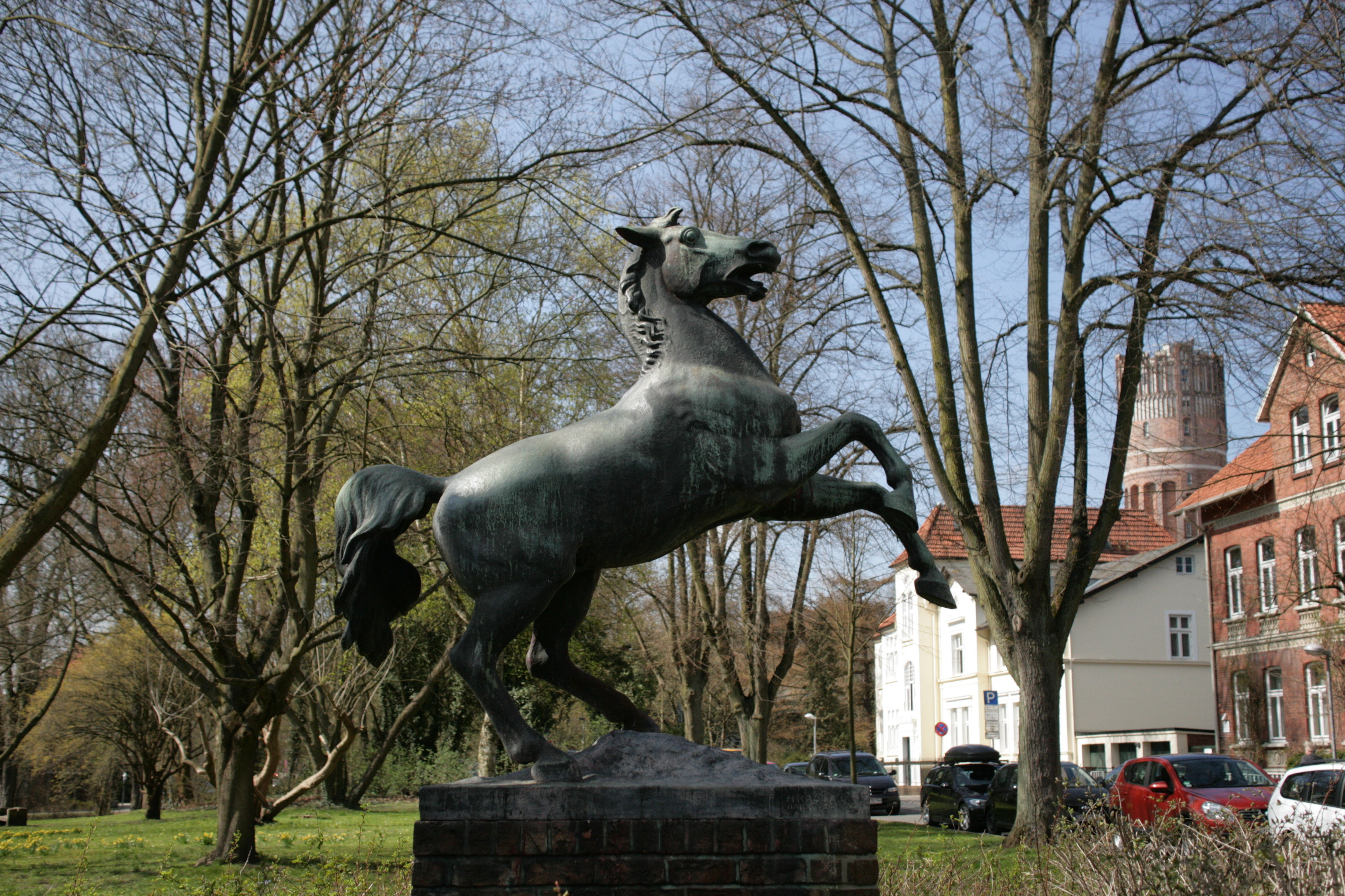 Clamartpark an der Friedenstraße in Lüneburg